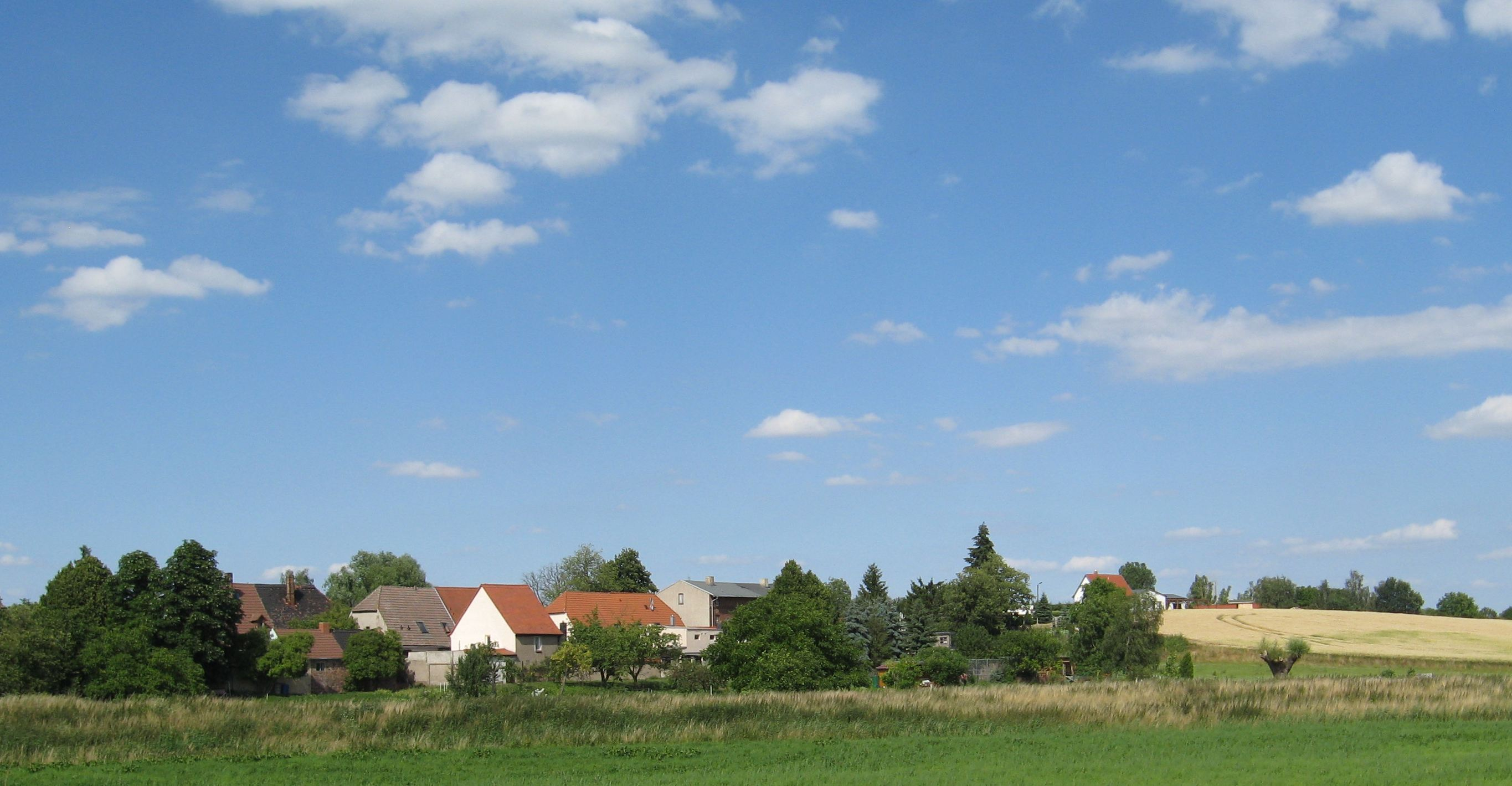 Cattau - OpenStreetMap(Info)